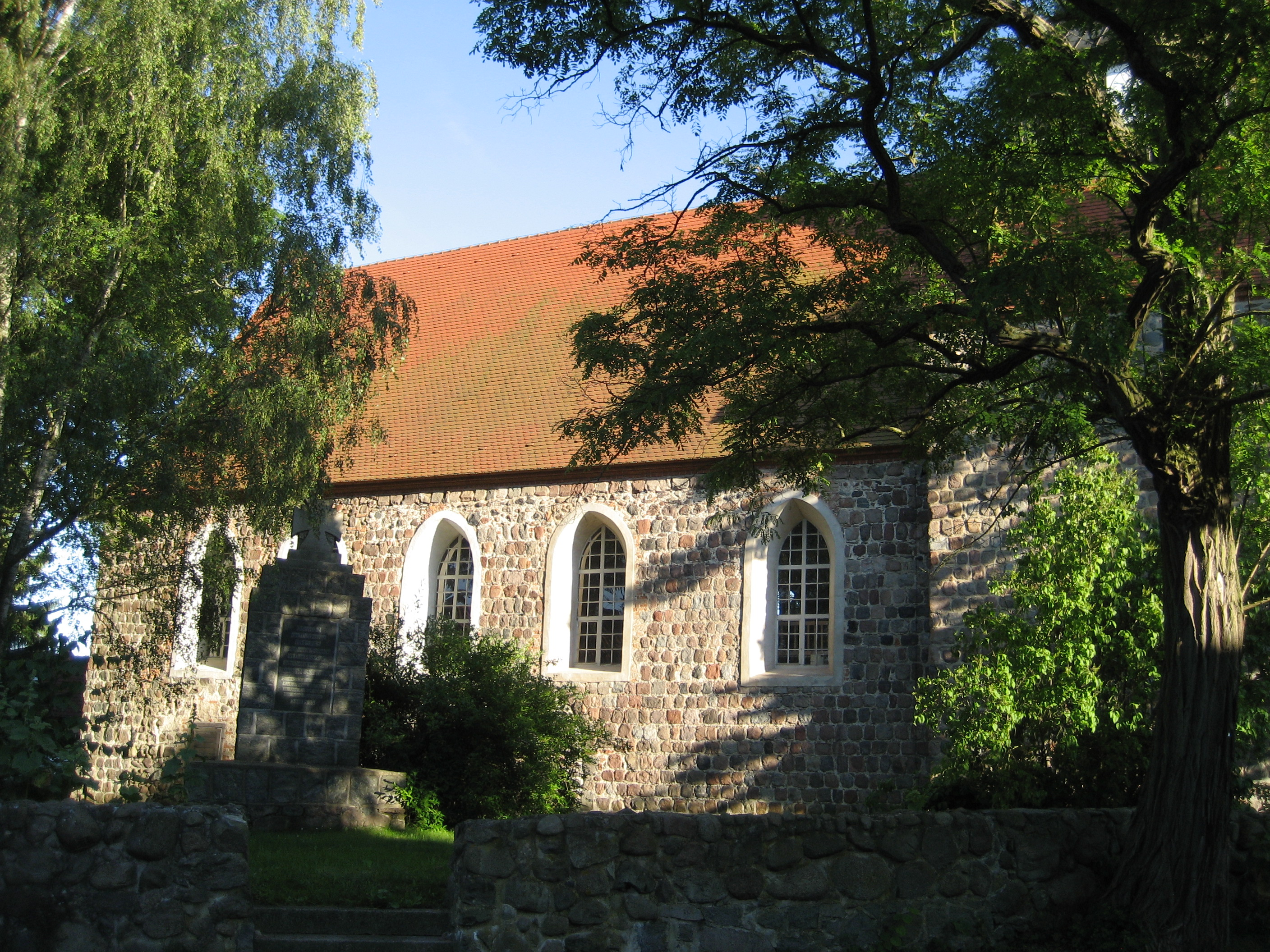 Kirche Zerrenthin aus Blickrichtung Norden.